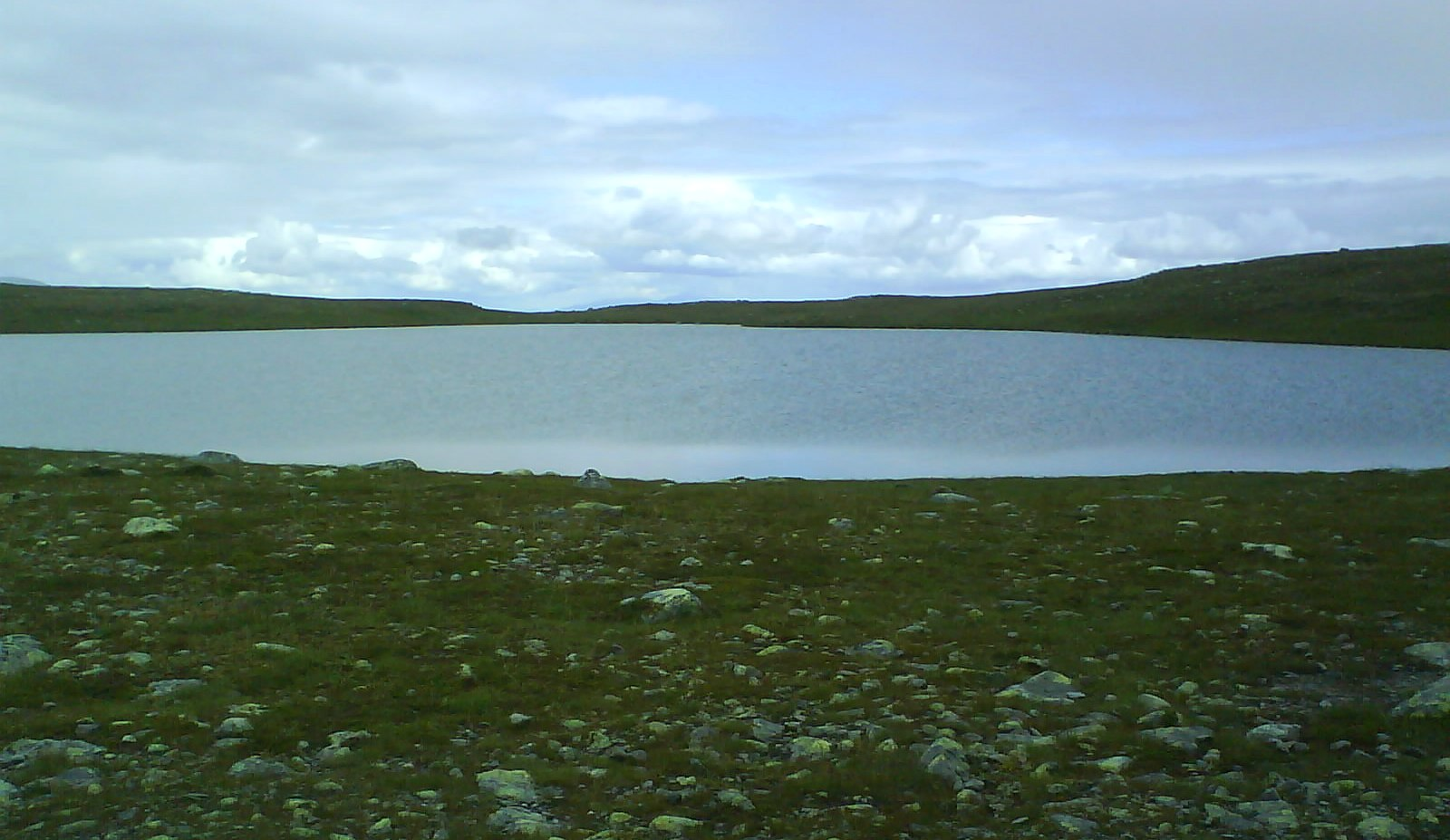 Tjärnen på Storvätteshågnas topp.